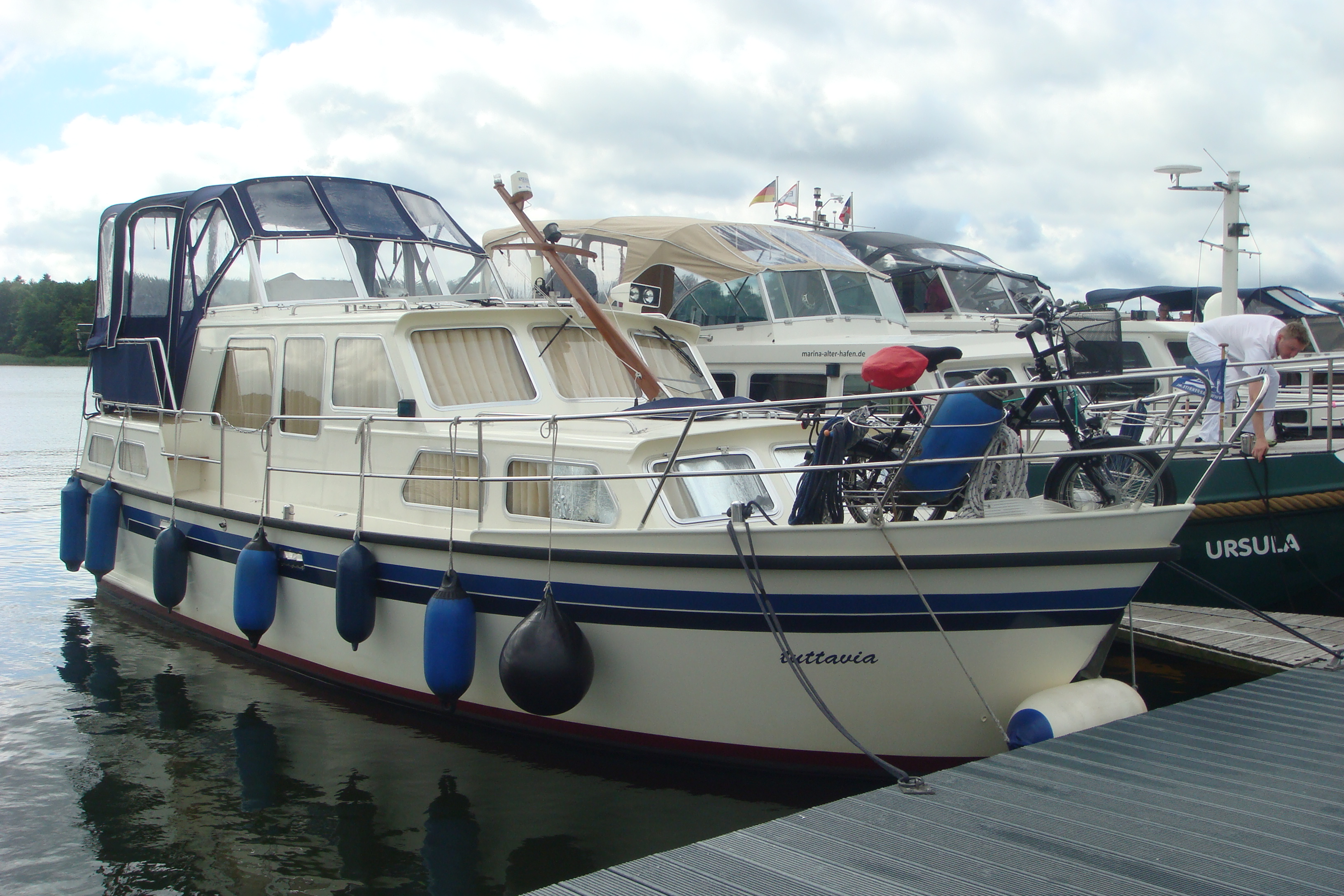 Jacht-barka typu waddenkruiser, konstrukcji z włókna szklanego